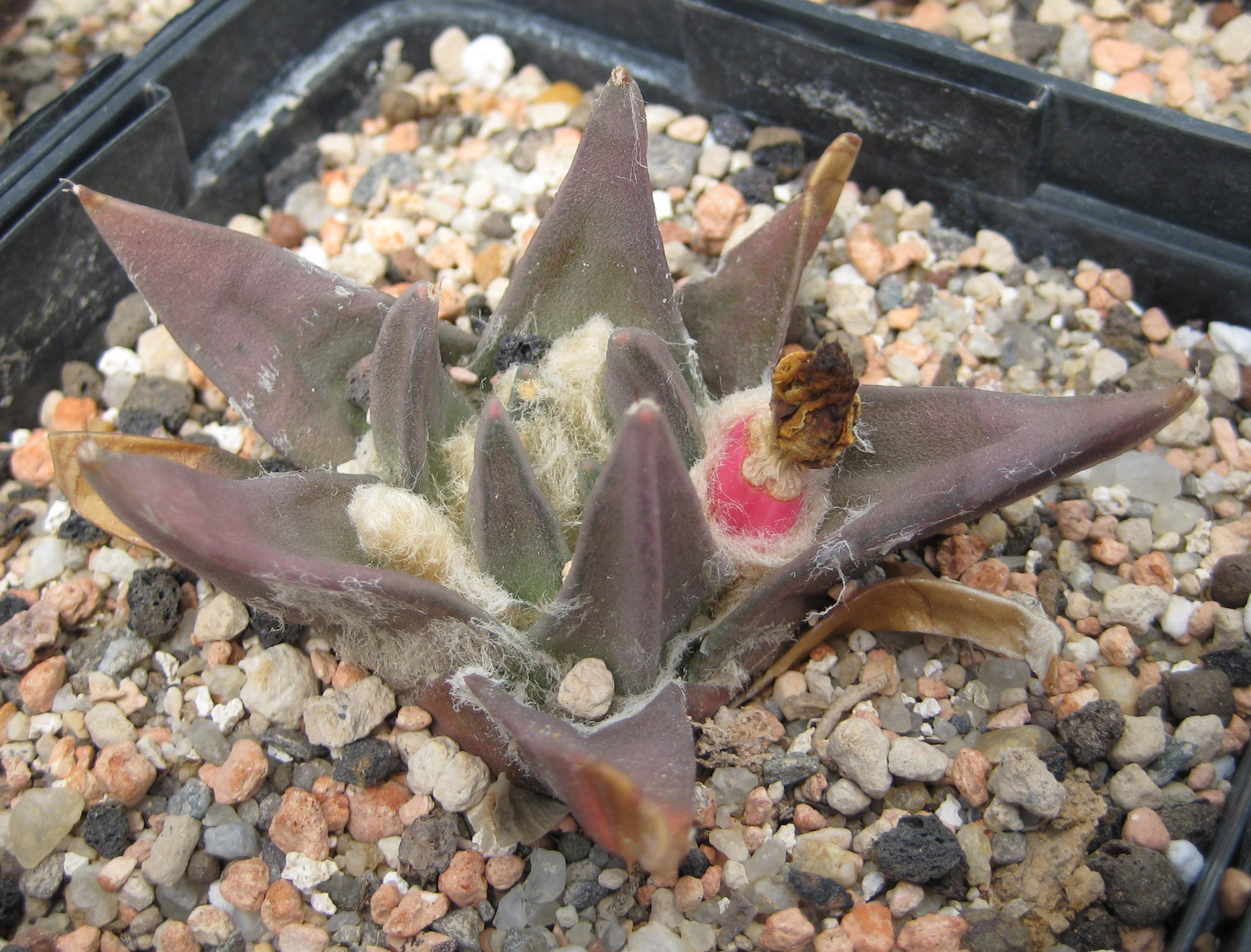 Ariocarpus trigonus mit Frucht